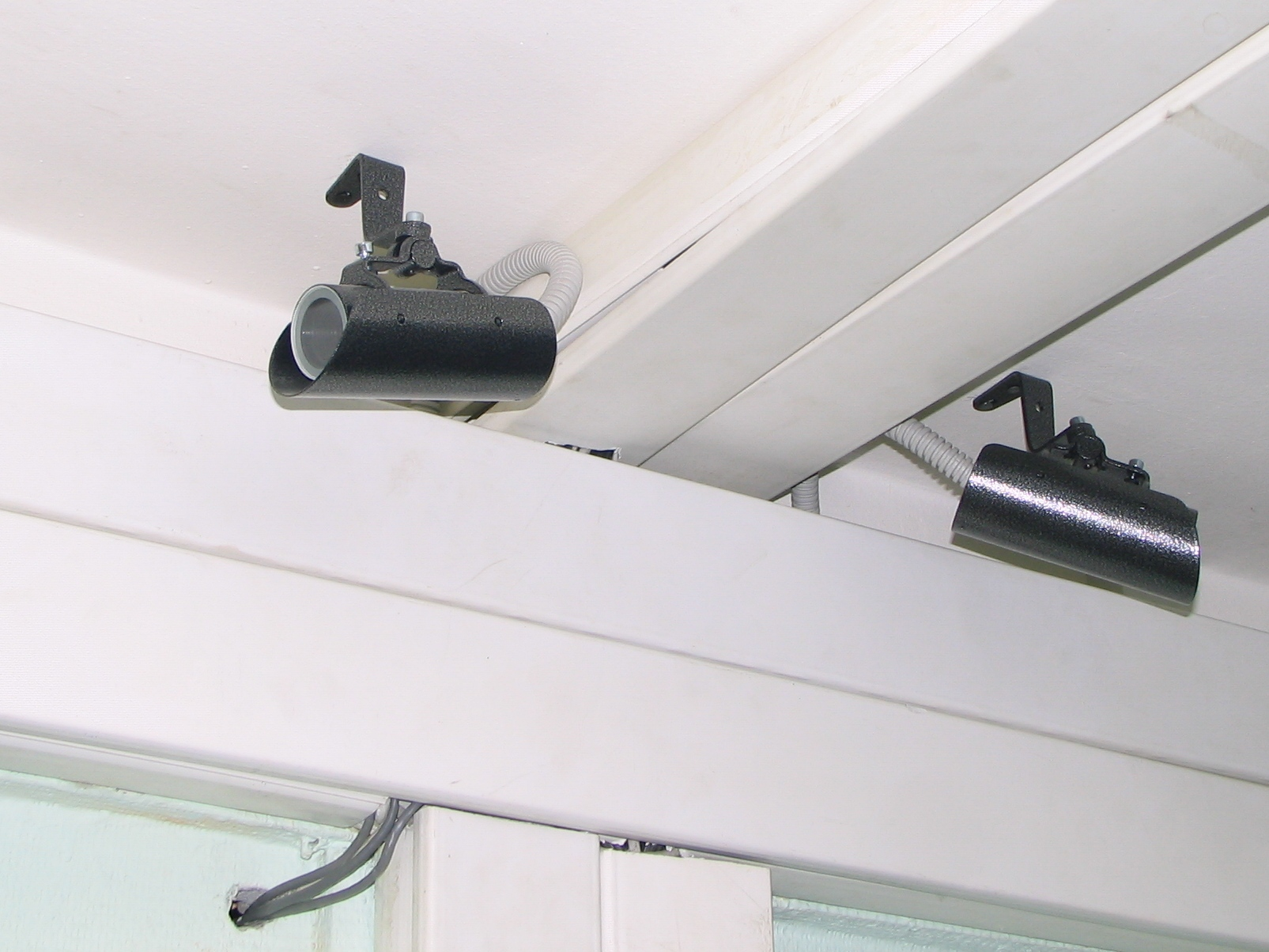 Камеры видеонаблюдения в коридоре общежития ДАС МГУ